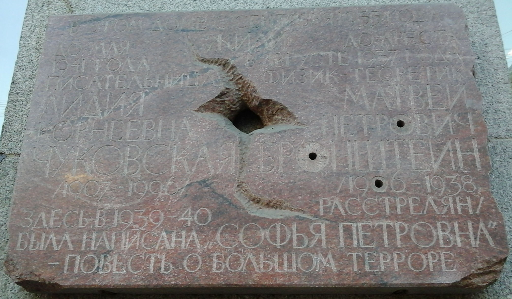 Мемориальная доска М.П. Бронштейну и Л.К. Чуковской на доме 11 по Загородному проспекту со стороны ул. Рубинштейна (Санкт-Петербург). Архитектор В.Б. Бухаев. Гранит. Установлена в марте 1997 года. Фотография 2014 года